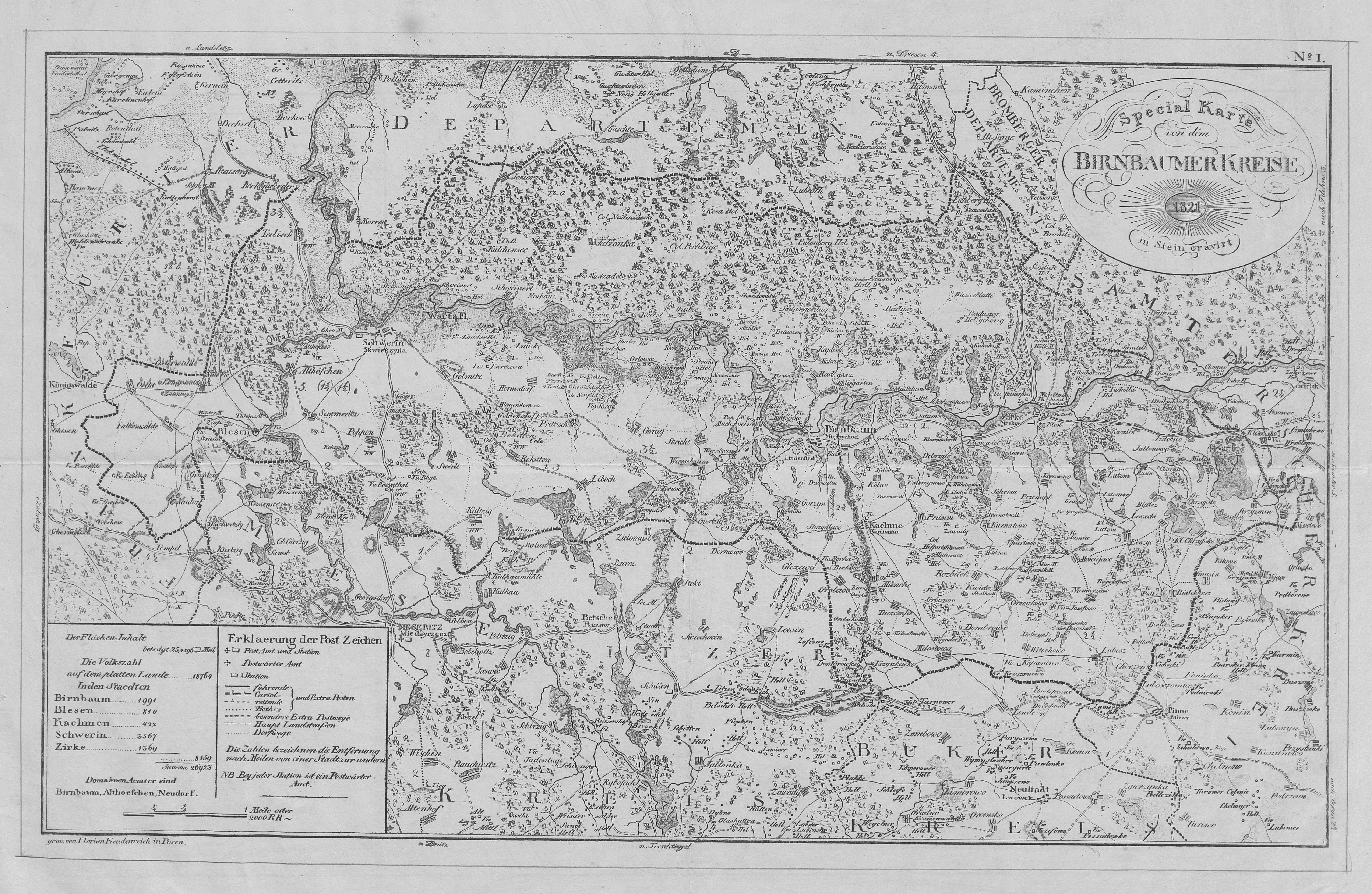 Kreis Birnbaum as from 1818 to 1887